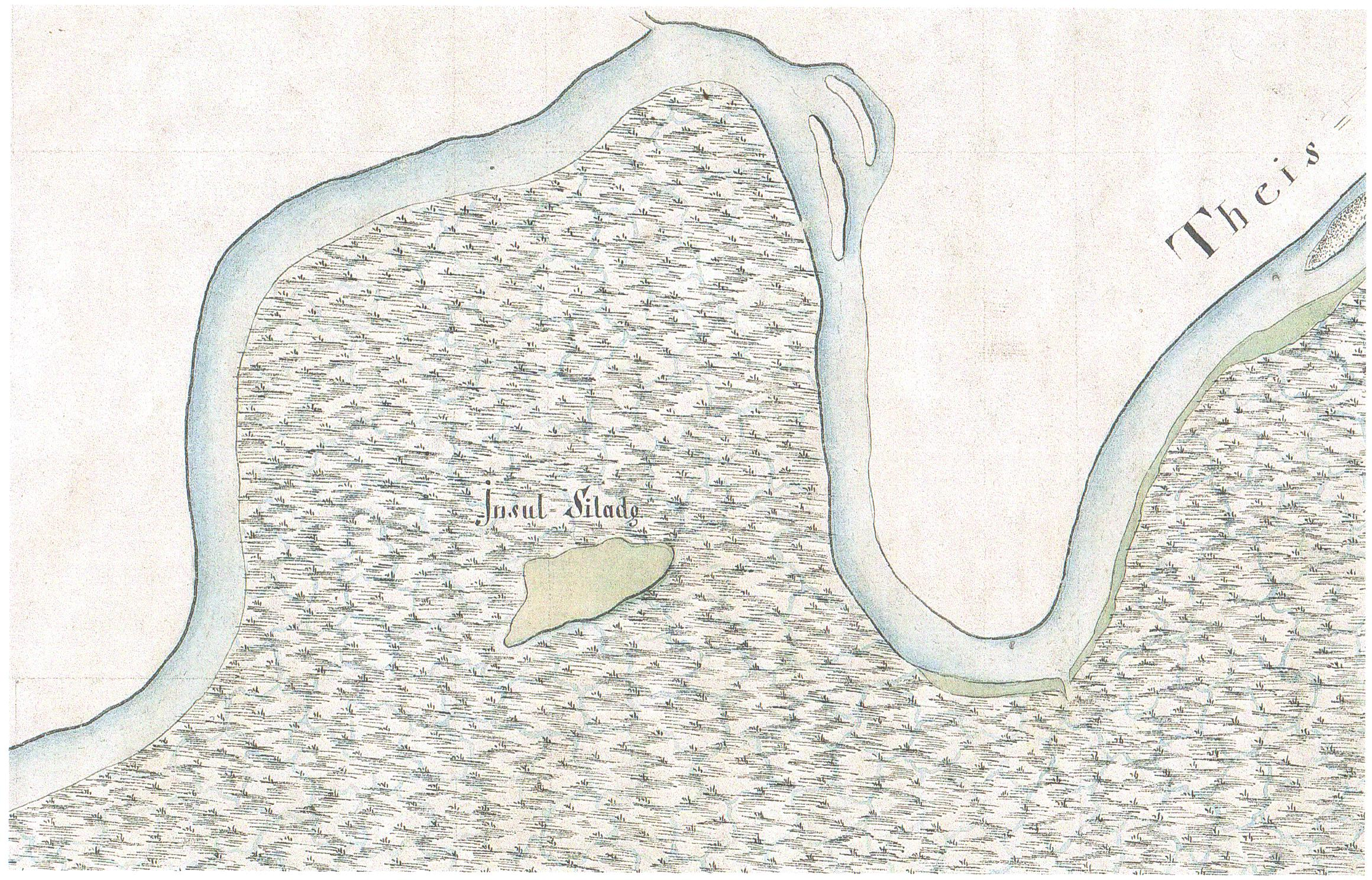 Gyálarét az első katonai felmérésen (1784)